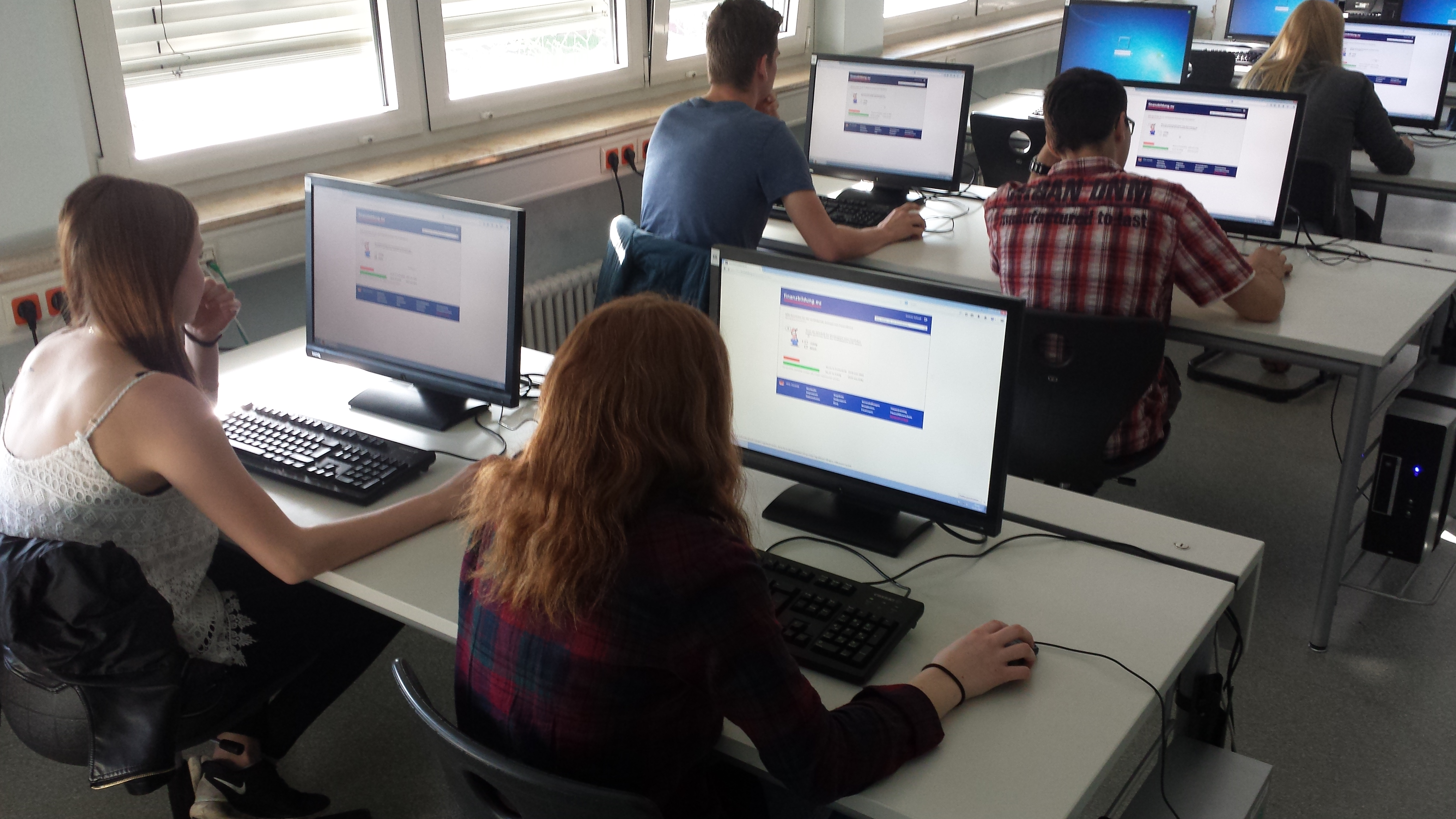 Kaufmännische Schule Tauberbischofsheim: Online Prüfung für den Europäischen Finanzführerschein (Zertifikate-Erwerb) im Schuljahr 2014-2015. Mit dem „Europäischen Finanzführerschein“ (auch „€FDL“ für „€uro Finance Driving Licence“) wird das Finanzwissen von Jugendlichen und Erwachsenen getestet, erweitert und mit einem Zertifikat bestätigt.